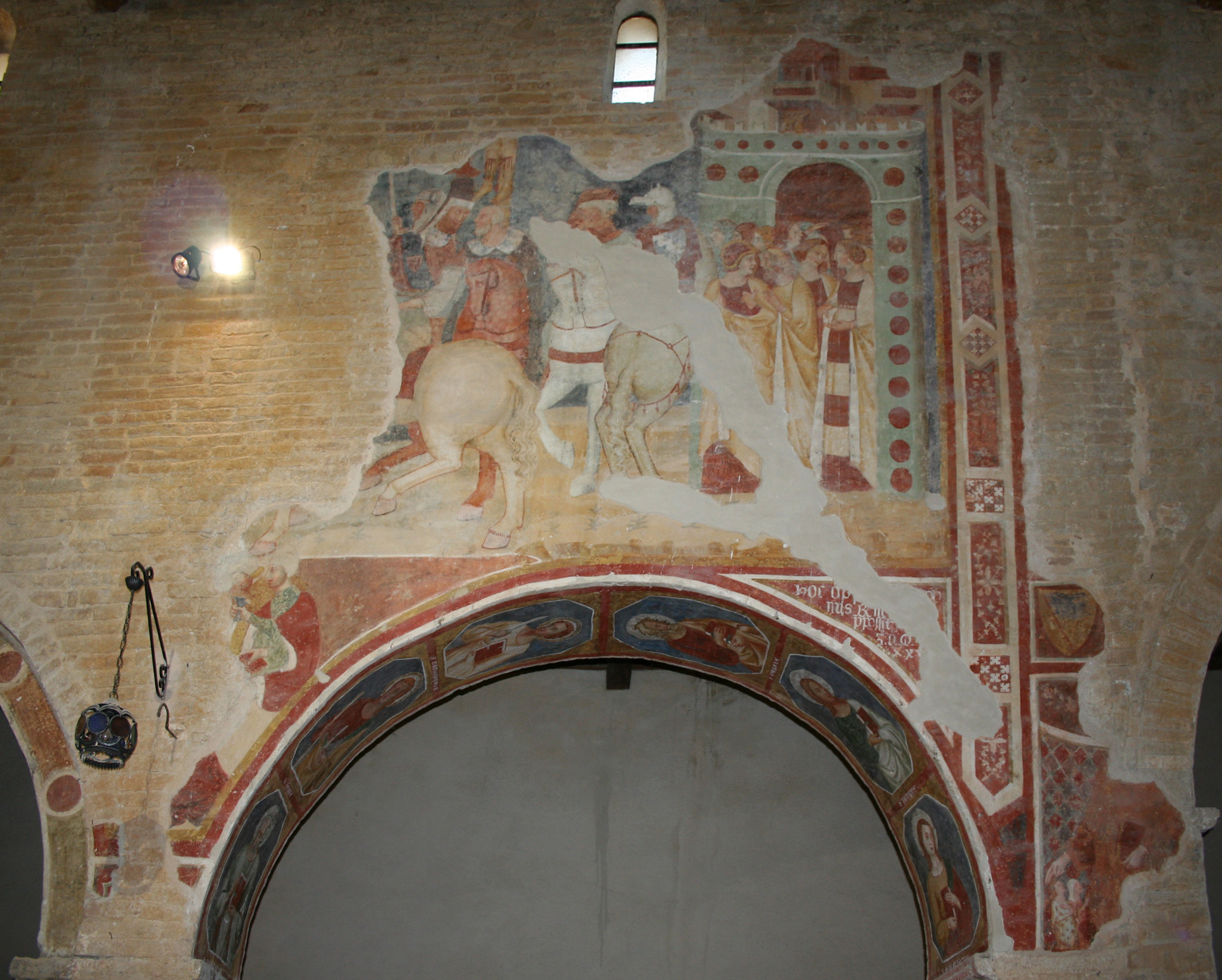 Chiesa di San Salvatore di Canzano, affreschi interni all'edificio religioso appartenente al complesso abbaziale omonimo nel paese di Canzano in provincia di Teramo, Abruzzo, Italia. Un sentito ringraziamento alla Dott.ssa Katia Pompetti, Assessore alla Cultura per il Comune di Canzano, che accordandomi il permesso d’ingresso, ha consentito lo scatto di questa immagine.